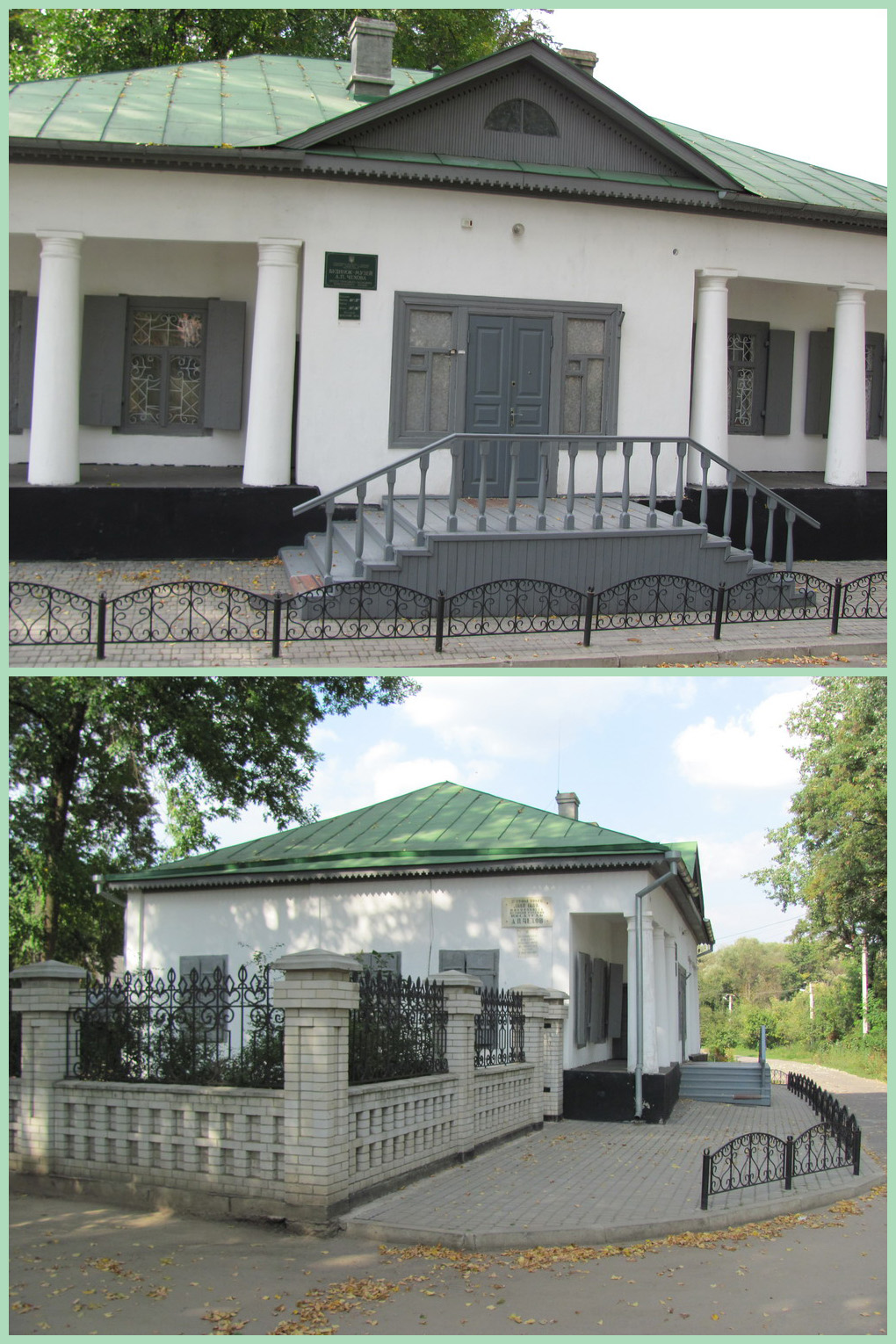 В этом доме в 1888-1889 гг. жил и работал великий русский писатель А. П. Чехов. Позже в этом доме размещался штаб 293-й стрелковой дивизии, которая формировалась в городе Сумы в июле 1941 года.